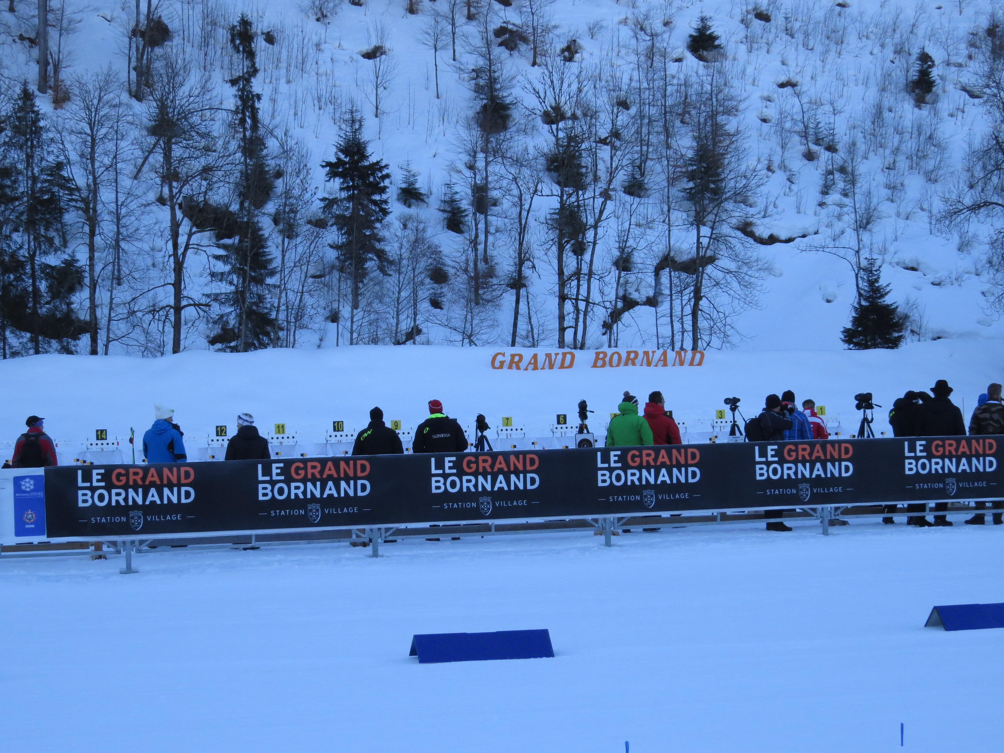 Photo réalisée sur le sprint masculin de biathlon au Grand Bornand